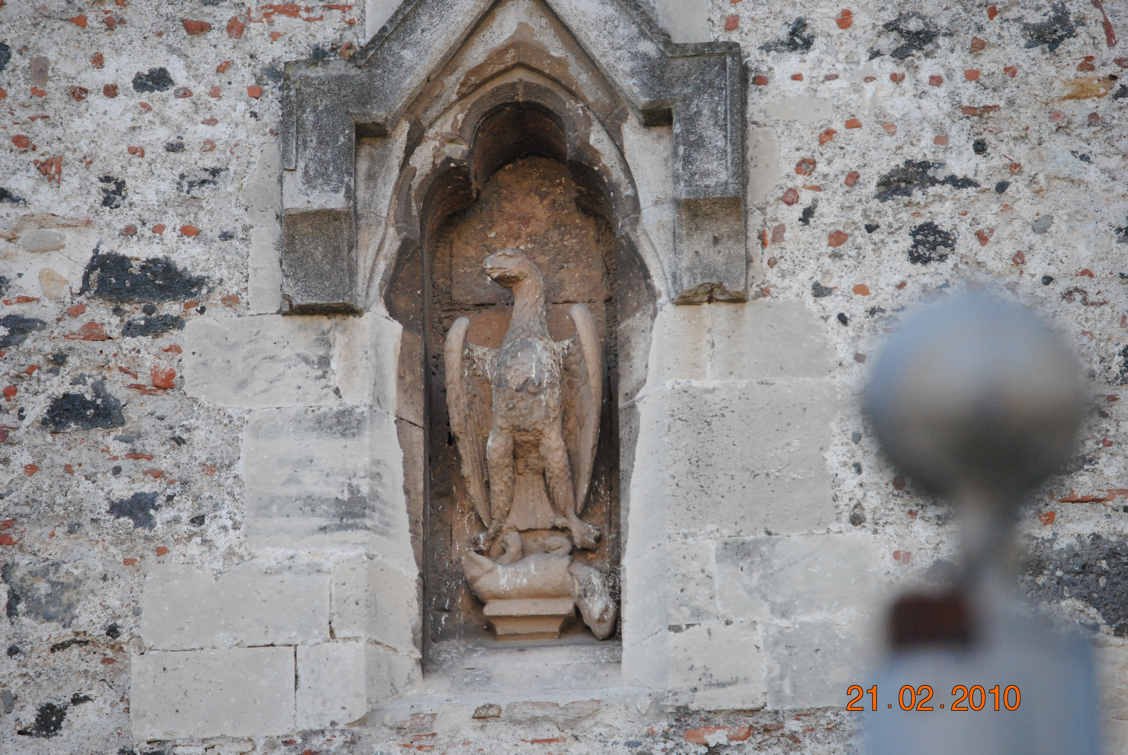 Nicchione decorativo della facciata del Castello Ursino. L'Aquila rappresenta il potere dell'Imperatore, la lepre la città di Catania soggiogata